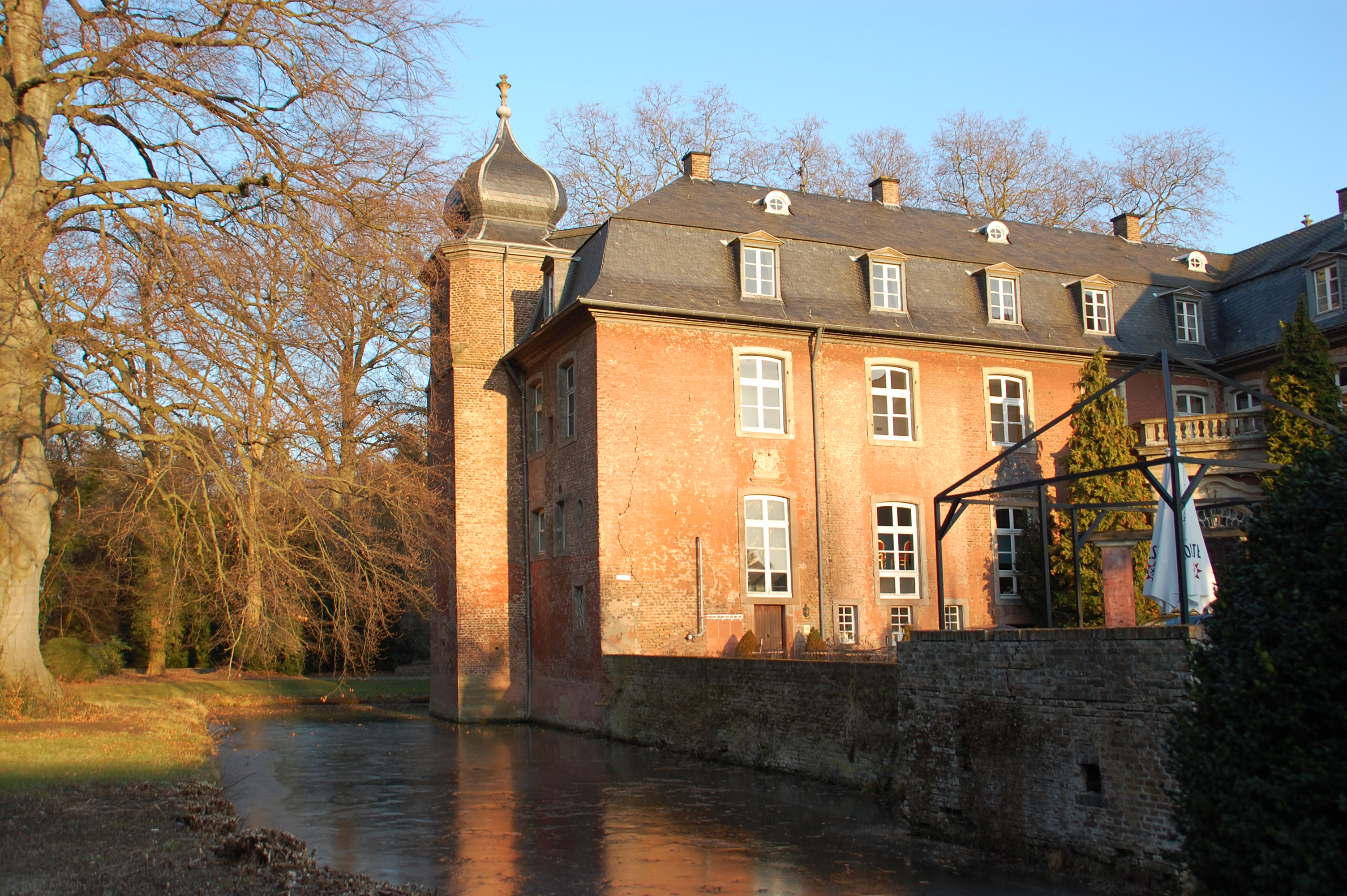 Schloss Gymnich, Erftstadt, Germany